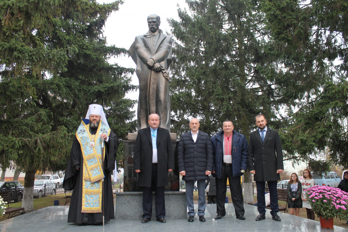 Відкриття пам'ятника Тарасові Шевченку у селі Підгайці, Луцький район, Волинська область (4 листопада 2018 року)